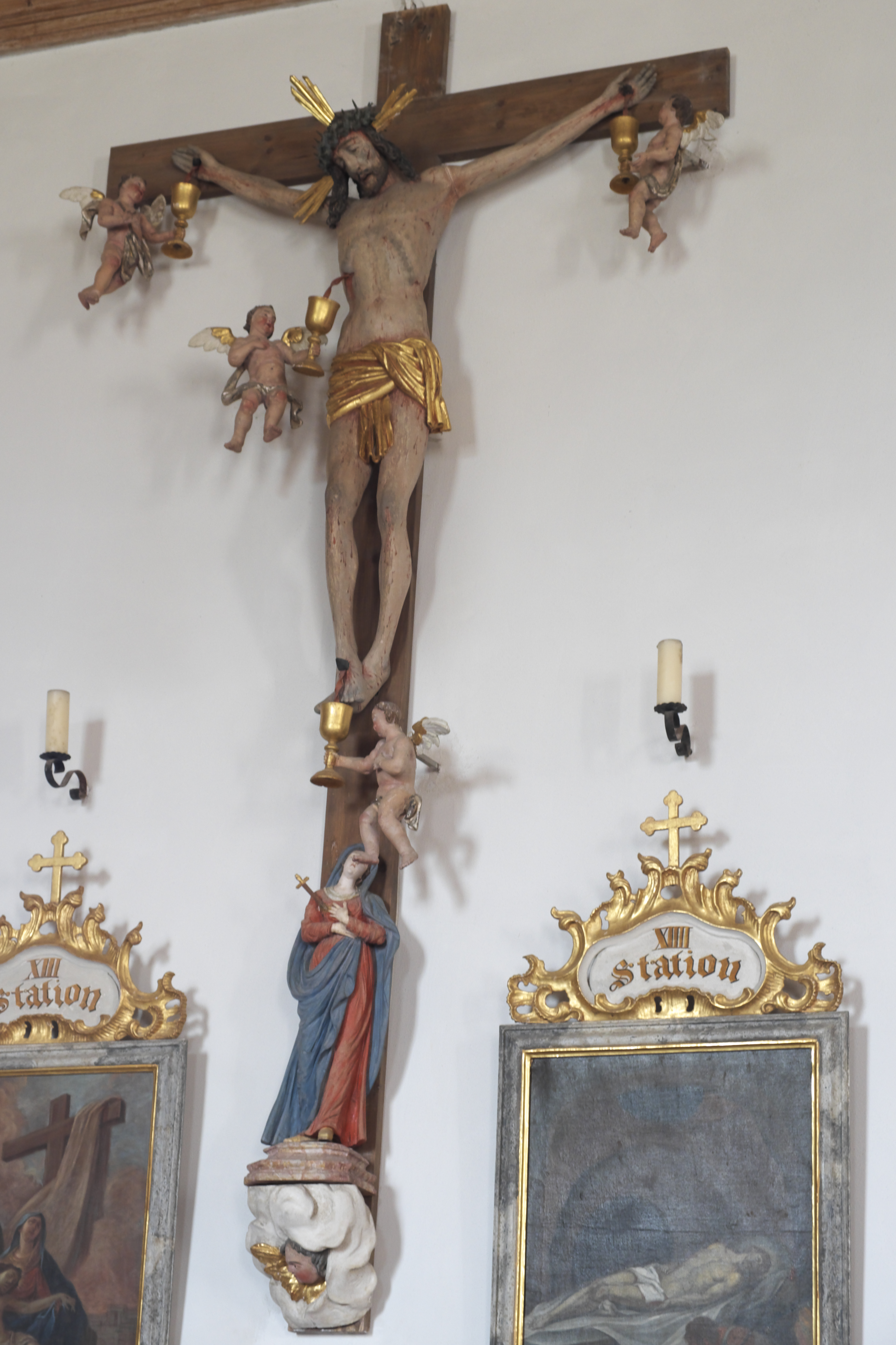 Katholische Filialkirche St. Maria Magdalena in Urspring, einem Ortsteil von Steingaden im Landkreis Weilheim-Schongau (Bayern/Deutschland), frühbarockes Kruzifix mit schmerzhafter Muttergottes und Putten, die das Blut Christi auffangen